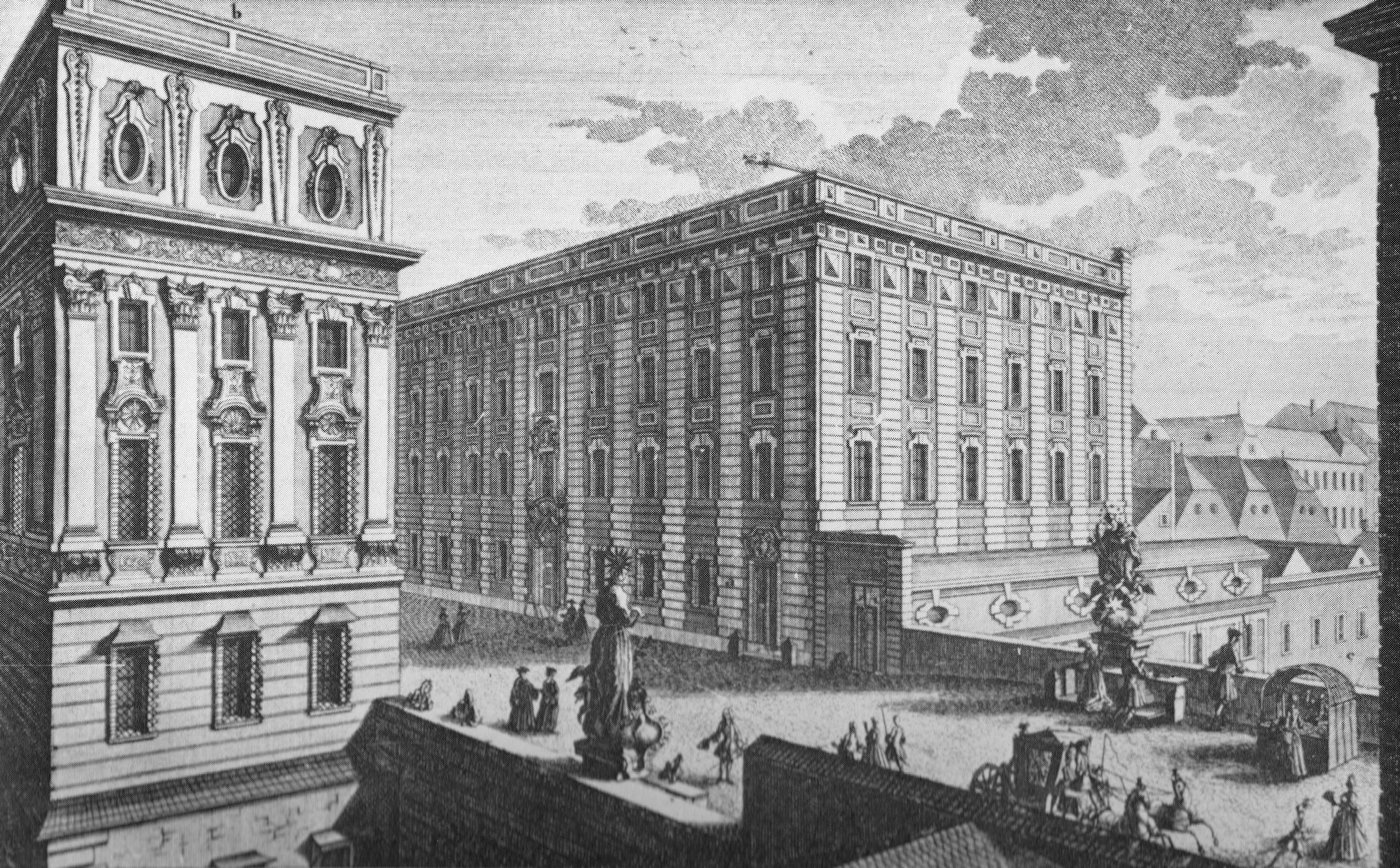 Palais Triangi an der Hohen Brücke in Wien im 18. Jahrhundert